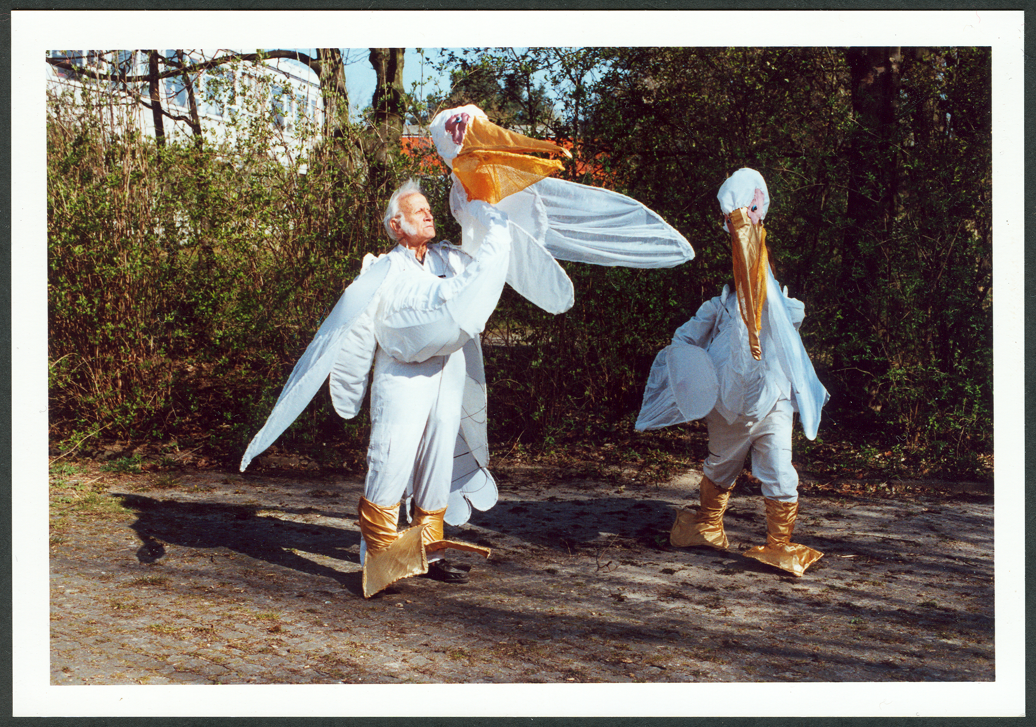 Pelikane zum Anziehen: Der Künstler und ehemalige Leiter des Scharniertheaters Hannover, Hans-Ulrich Buchwald und ein(e) Schauspieler(in) bei der Anprobe ihrer Kostüme und Masken, hier vor der Brüder-Grimm-Schule im hannoverschen Stadtteil List, wo das Künstlerehepaar Buchwald ihr Lager hatte ...